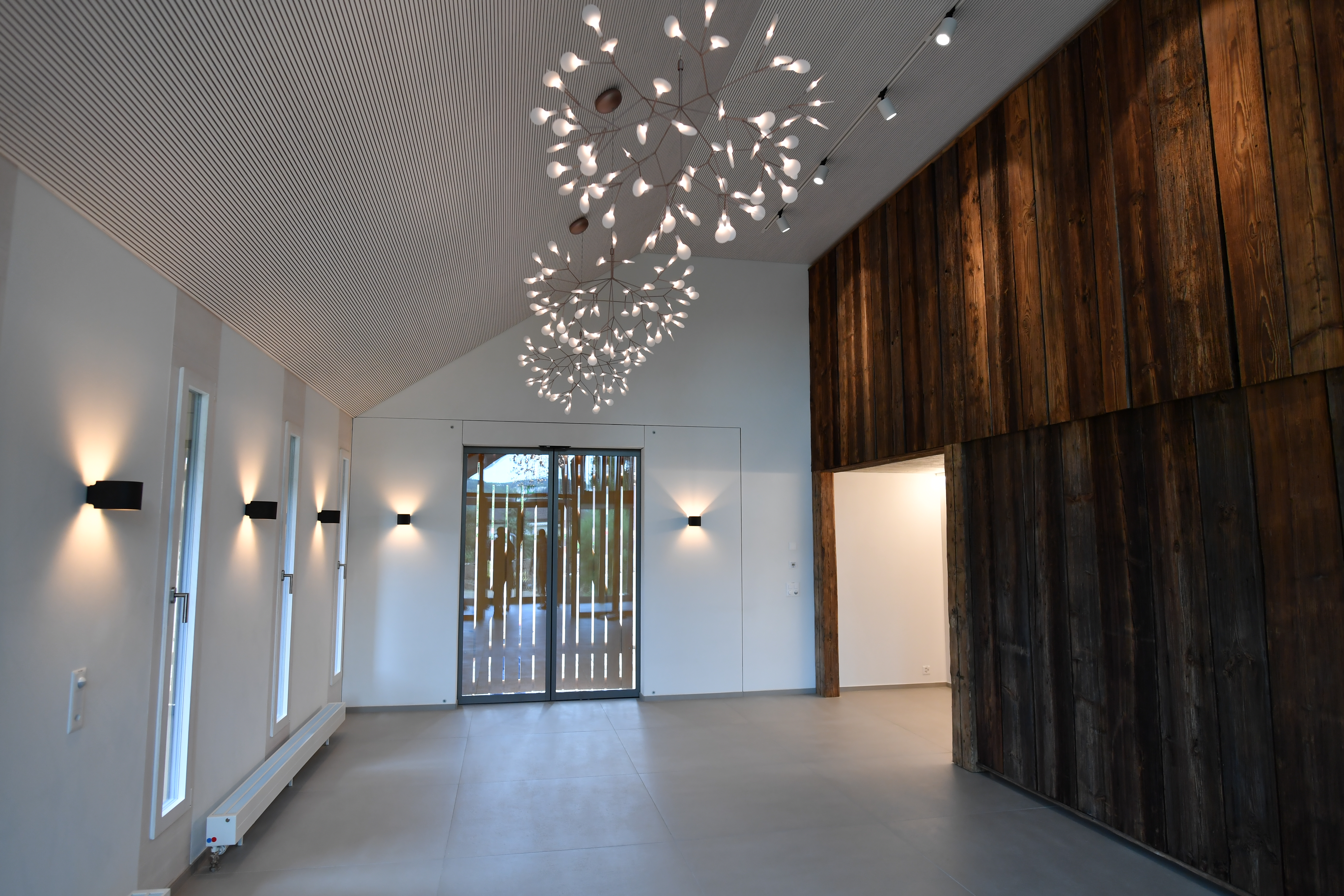 Kirchliches Zentrum St. Gabriel Schwerzenbach, Foyer